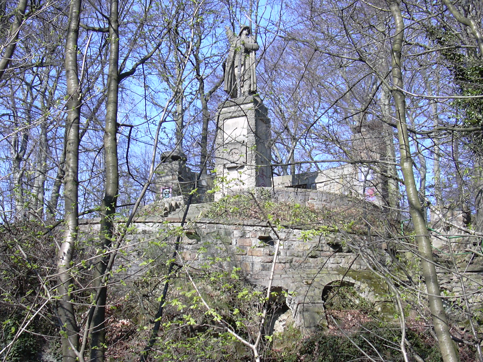 130er Denkmal auf dem Kellerkopf in Holzwickede-Hengsen. This is a photograph of an architectural monument.